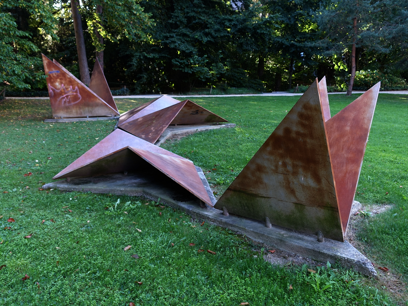 Plastik, Spiel mit zwei Quadraten, 1975, Wettsteinanlage hinter dem Spielzeugmuseum in Riehen, Basel, Schweiz. Von Theo Lauritzen (1911-1978) Plastiker, Zeichner